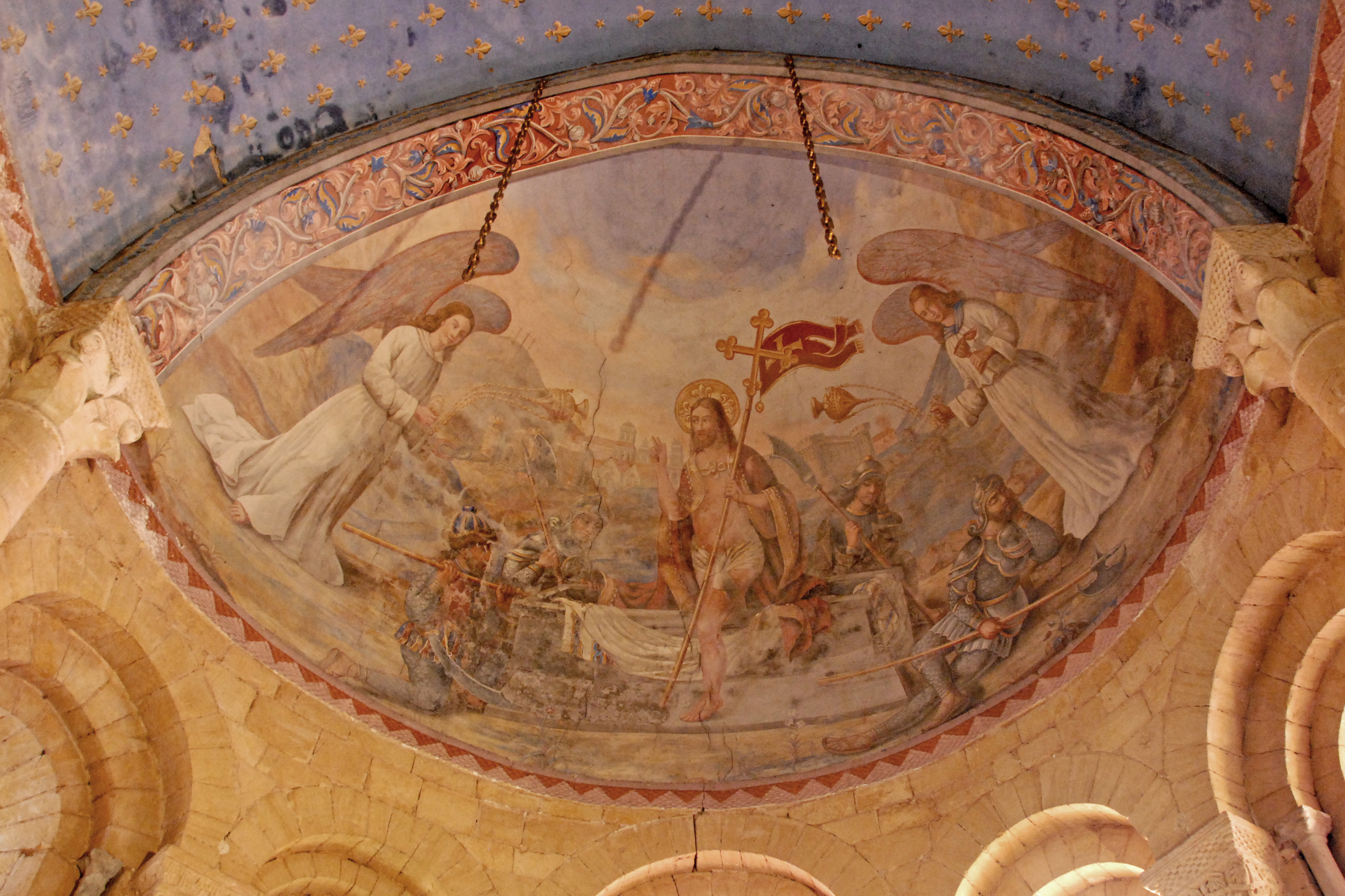 Cadouin, Chorkalotte, Putzmalerei